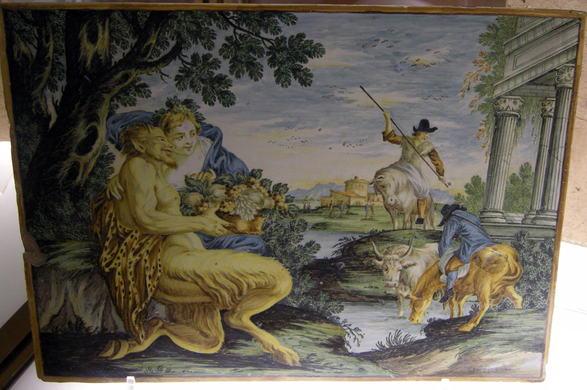 Palazzo Ducale di Urbino - Galleria Nazionale delle Marche - MIBAC This is a photo of a monument which is part of cultural heritage of Italy.